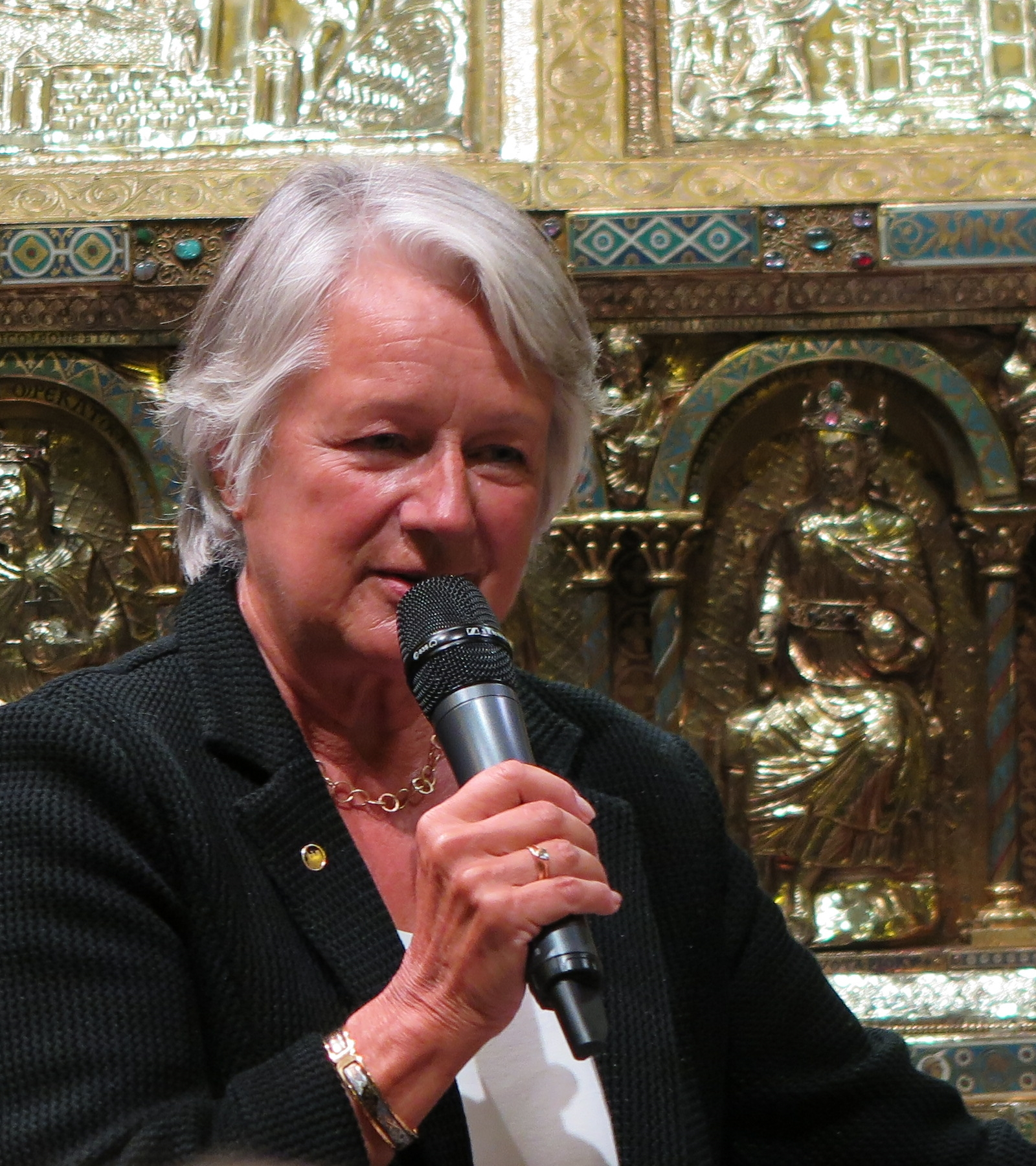 Dr. Herta Lepie erklärt die Ikonografie des Karlsschreins im Aachener Dom anlässlich der Feierlichkeiten „800 Jahre Karlsschrein“.